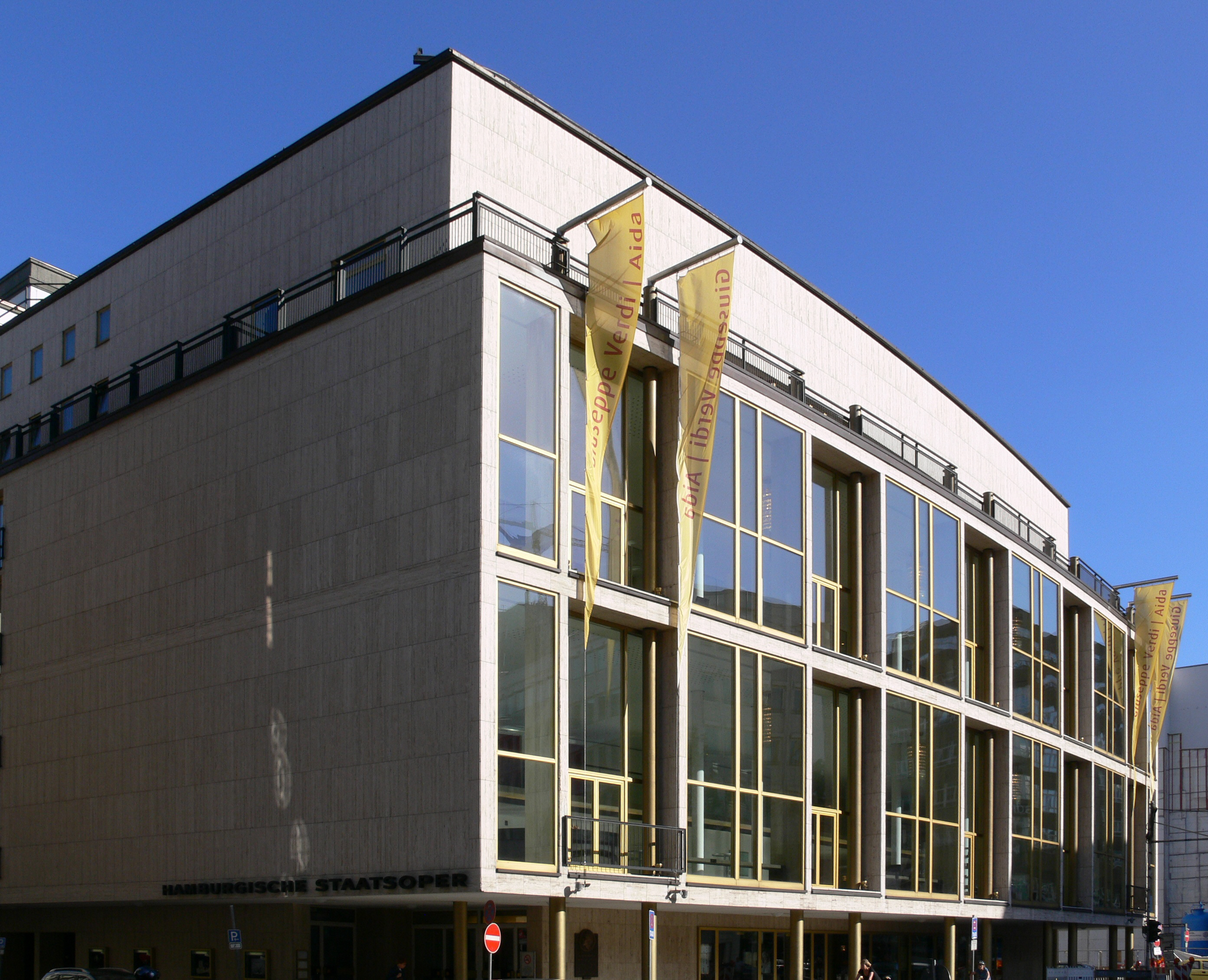 Hamburgische Staatsoper